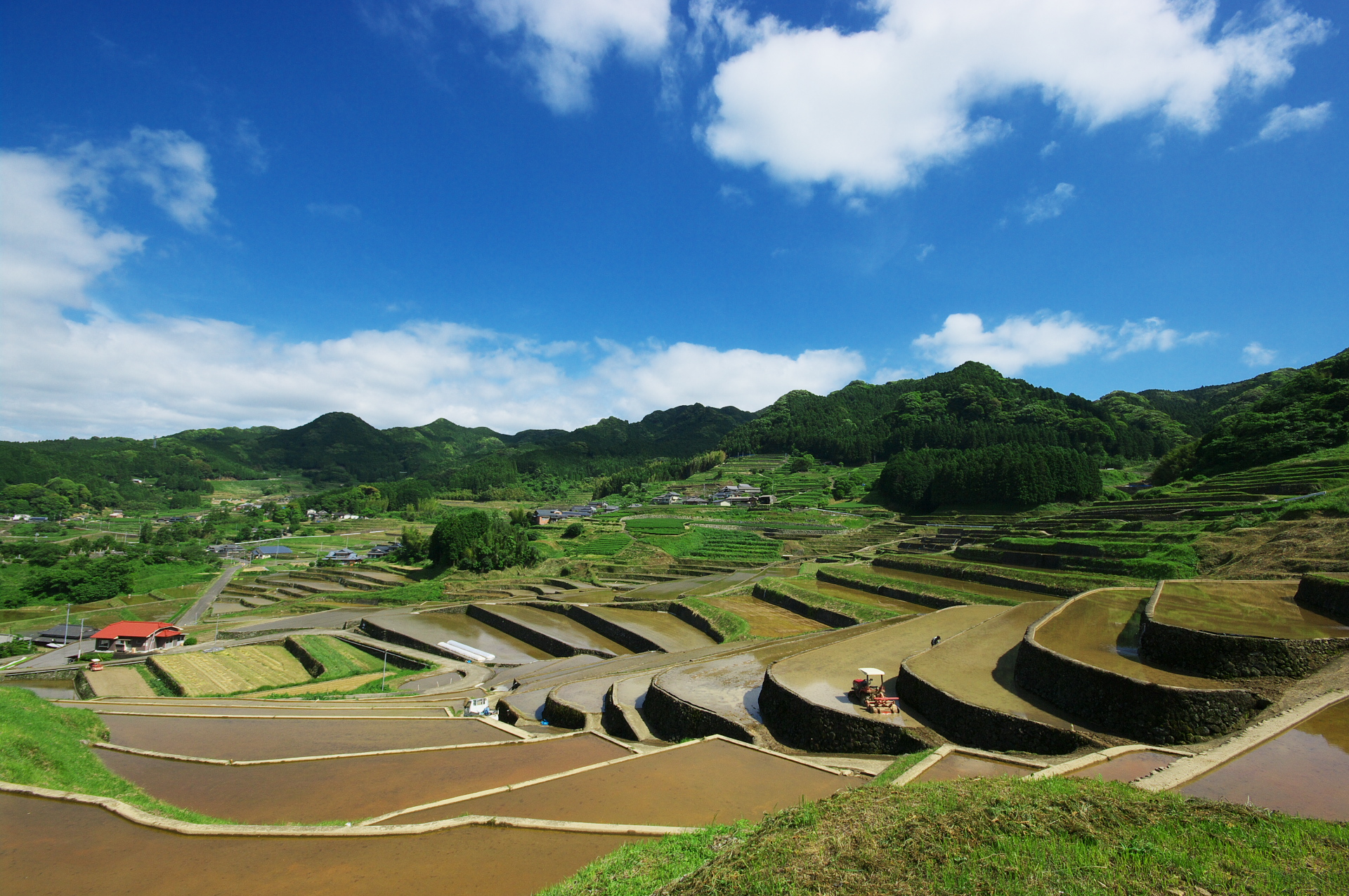 鬼木棚田 展望所より